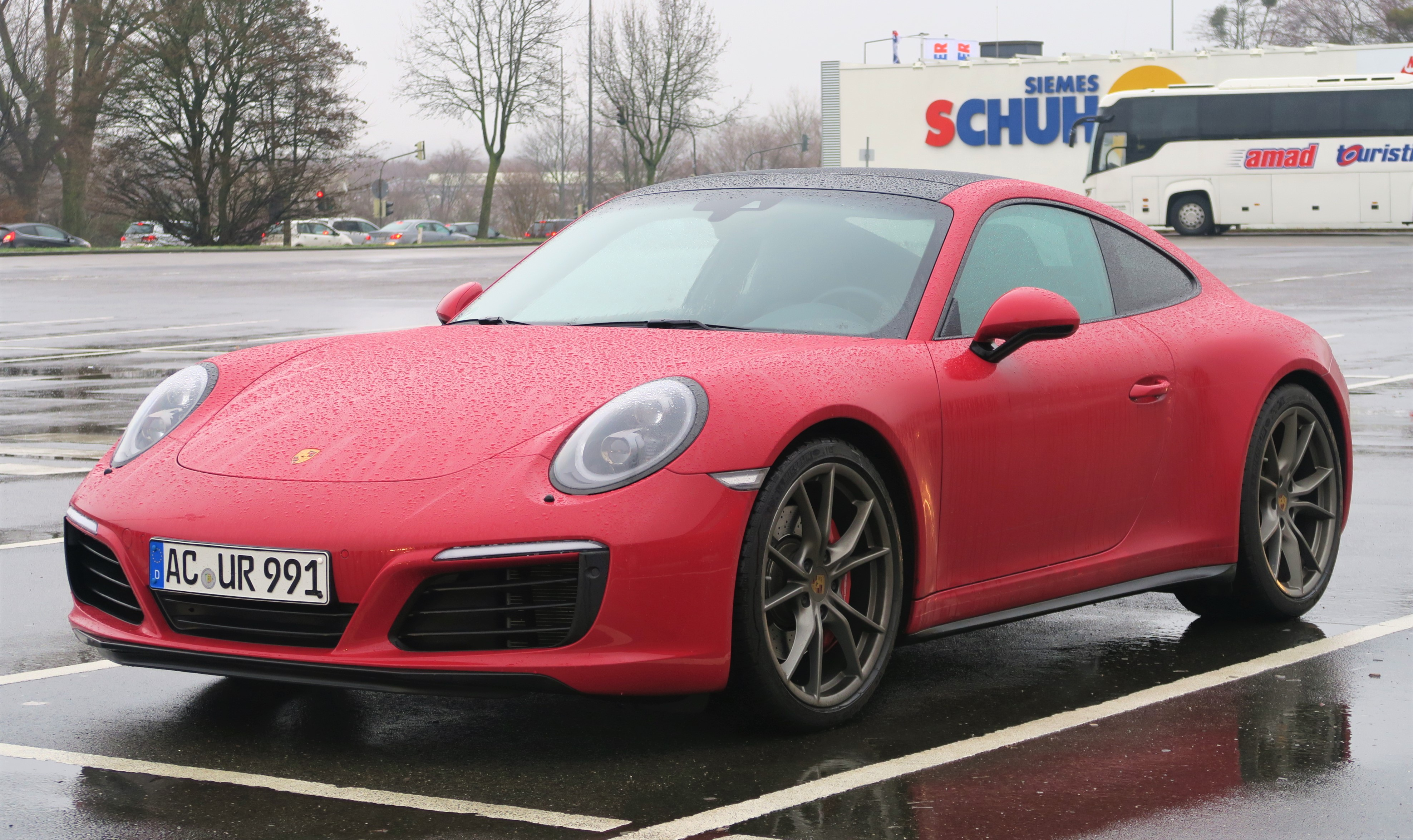 Porsche 911-4 Hirsch Center Aix-la-Chapelle